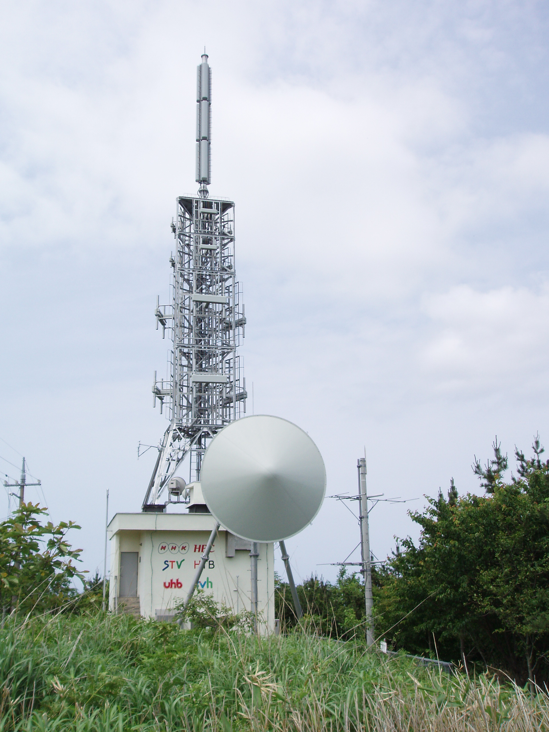 江差中継局 NHKアナログ、NHK・HBC・STV・HTB・UHB・TVhデジタル送信設備